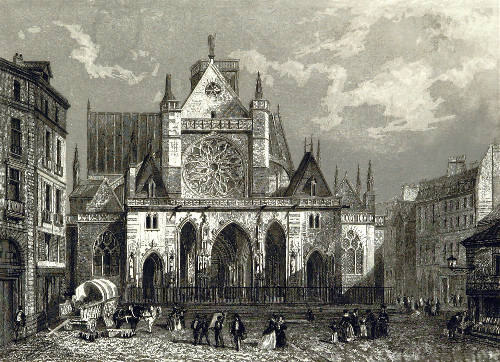 L'église de Saint-Germain l'Auxerrois à Paris en 1846, avant la destruction du tissu urbain ancien qui l'entourait